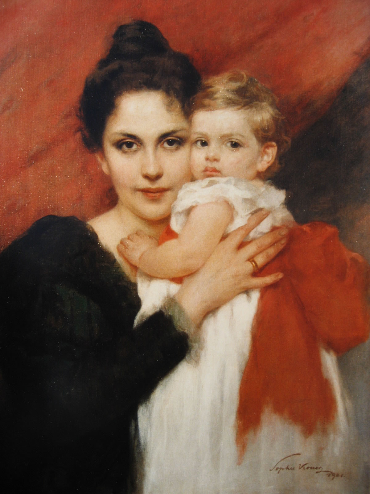 Sophie Koner: Painting of Maria Wilhelmine Hubertine Klemperer (née Umber, 1873-1937) with her son Otto Ernst Heinrich Klemperer, 1901